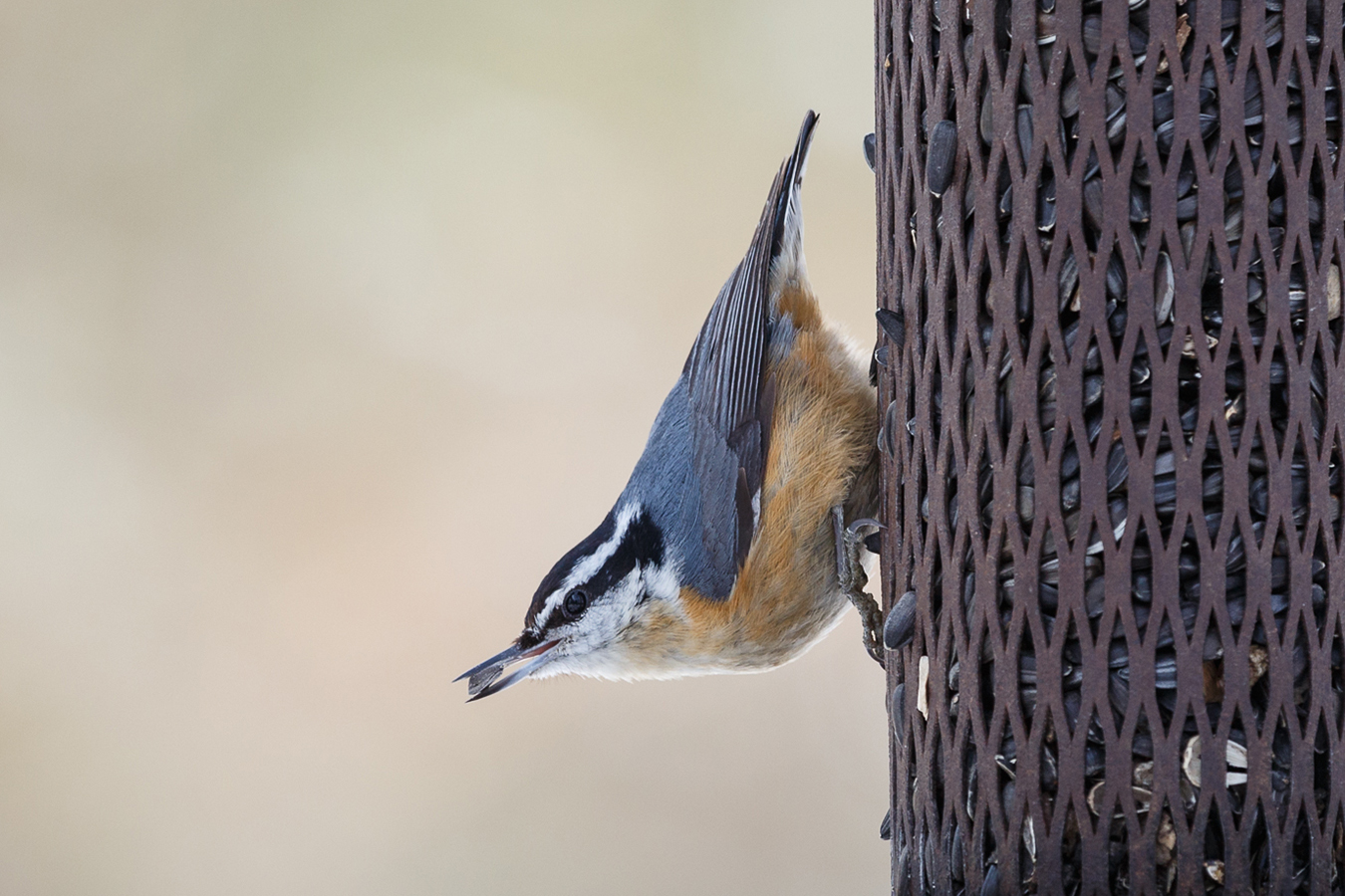 Канадский поползень у зимней кормушки